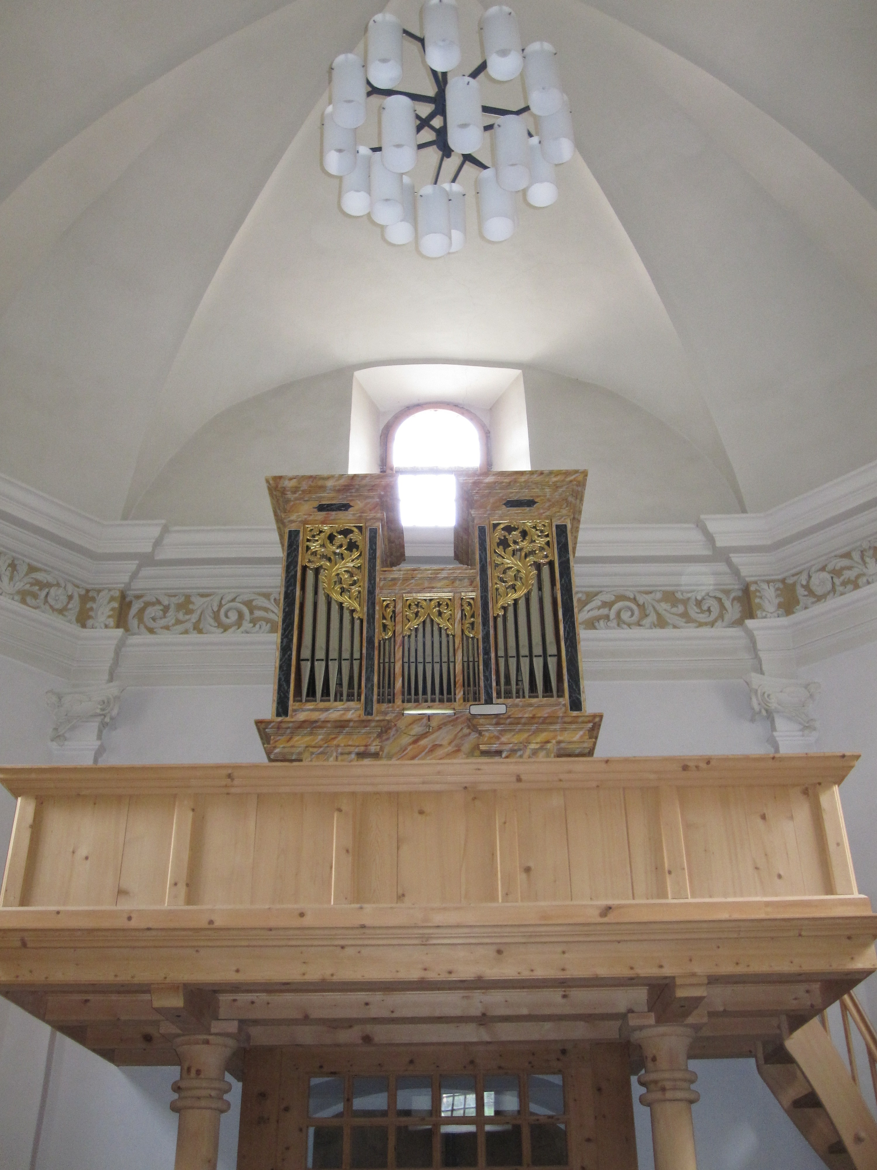 Orgel in der reformierten Kirche La Punt (Kanton Graubünden)